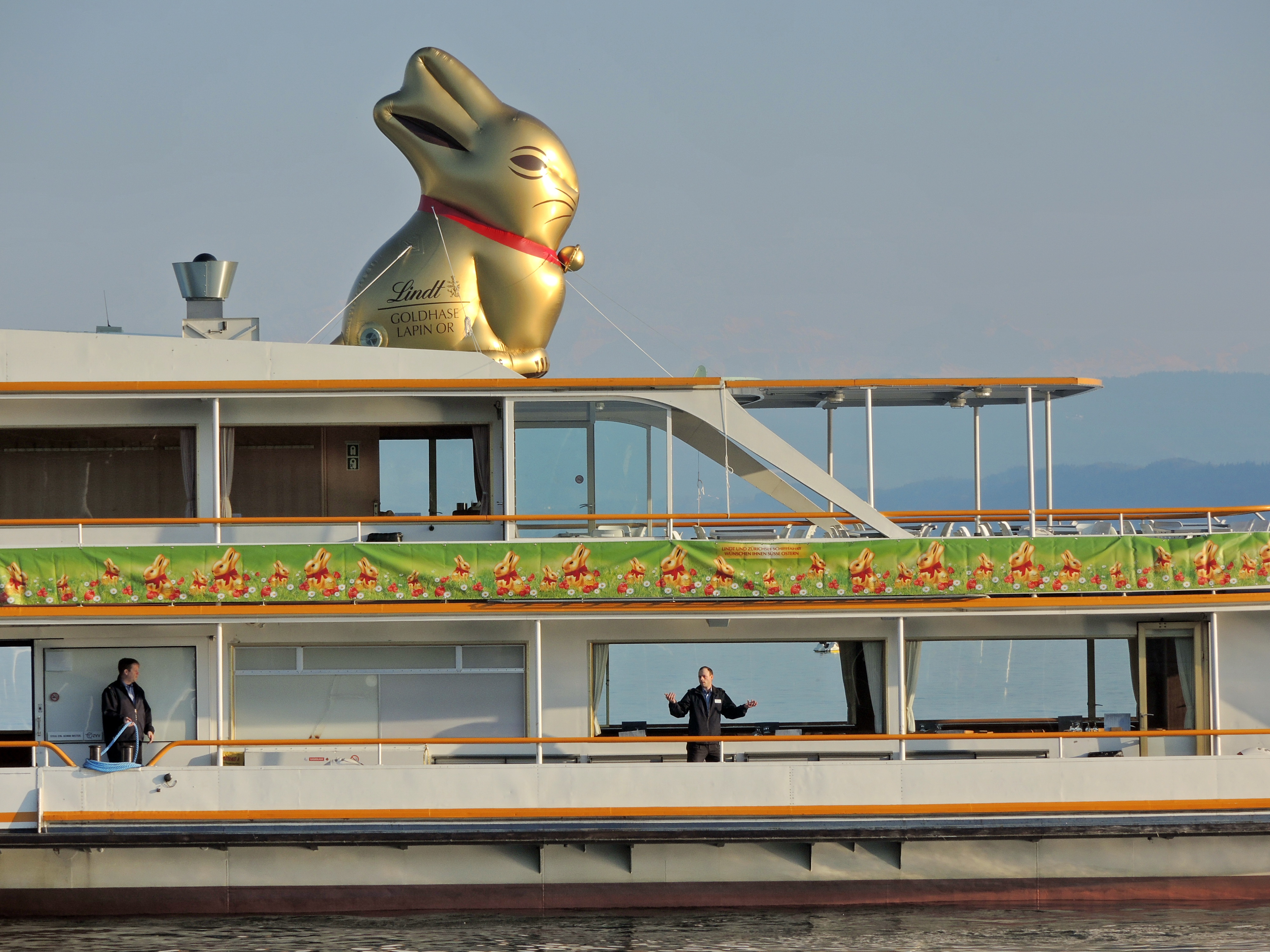 Bürkliplatz in Zürich (Switzerland),on Zürichsee-Schifffahrtsgesellschaft (ZSG) MS Wädenswil on Zürichsee